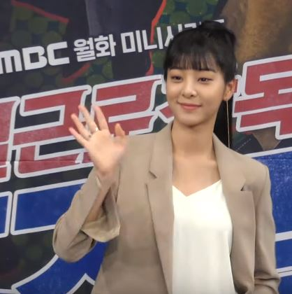 8일 오후 서울시 마포구 상암동 MBC 골든마우스홀에서 MBC 새 월화드라마 '특별감독관 조장품' 제작발표회가 열려 배우 김동욱X류덕환X박세영X설인아X김경남이 포토타임을 갖고 있다.